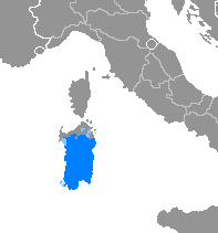 Idioma sardo